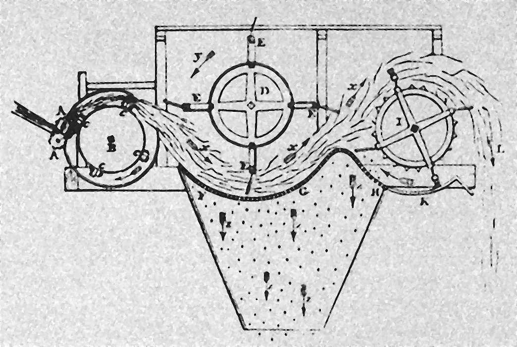 Treskjeverket til Meikle frå 1785 (av Andrew Meikle).